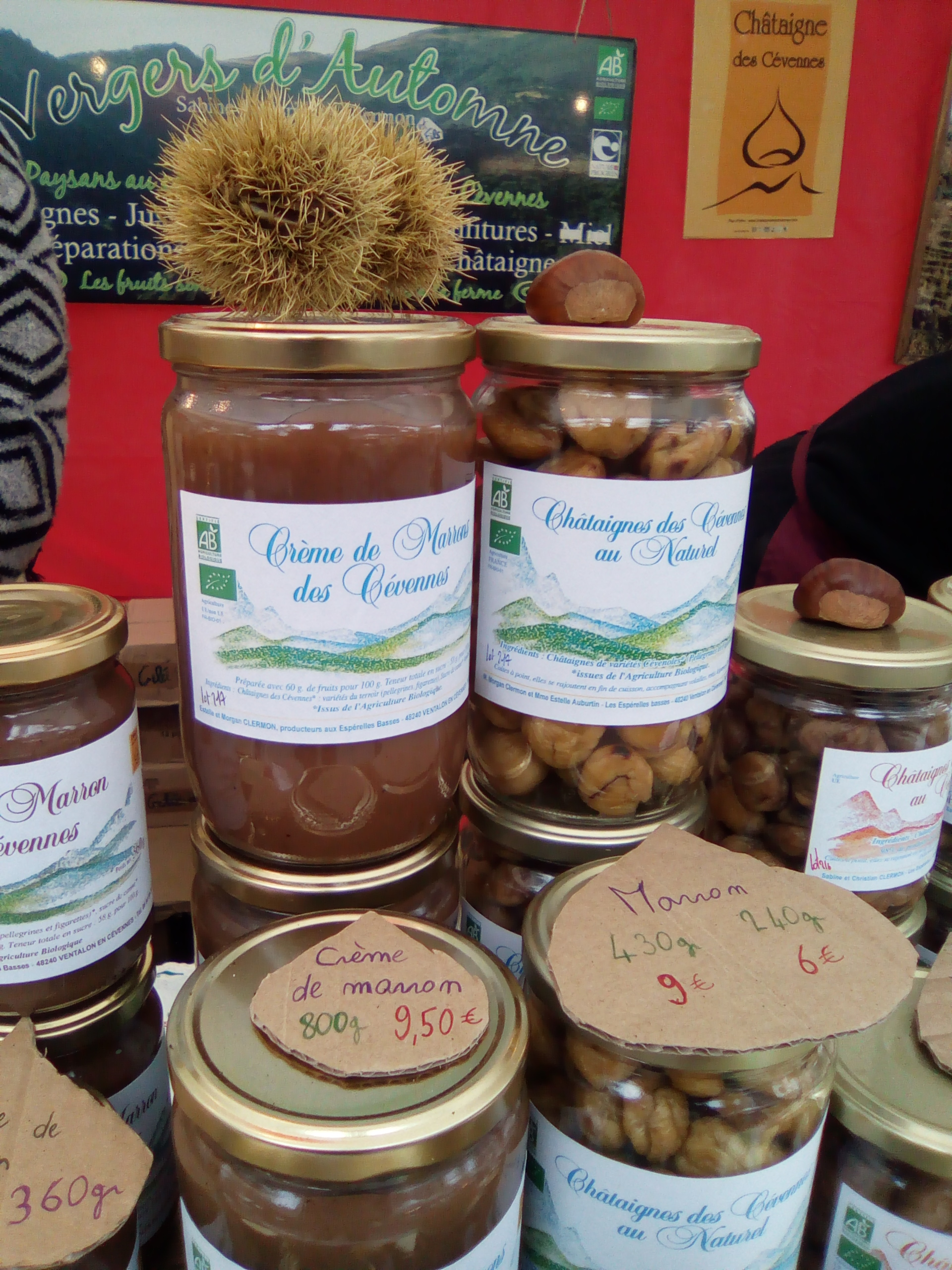 Stand de crème de marrons des Cévennes produite à Ventalon en Cévennes (Lozère), marché des producteurs de pays, boulevard de Reuilly.